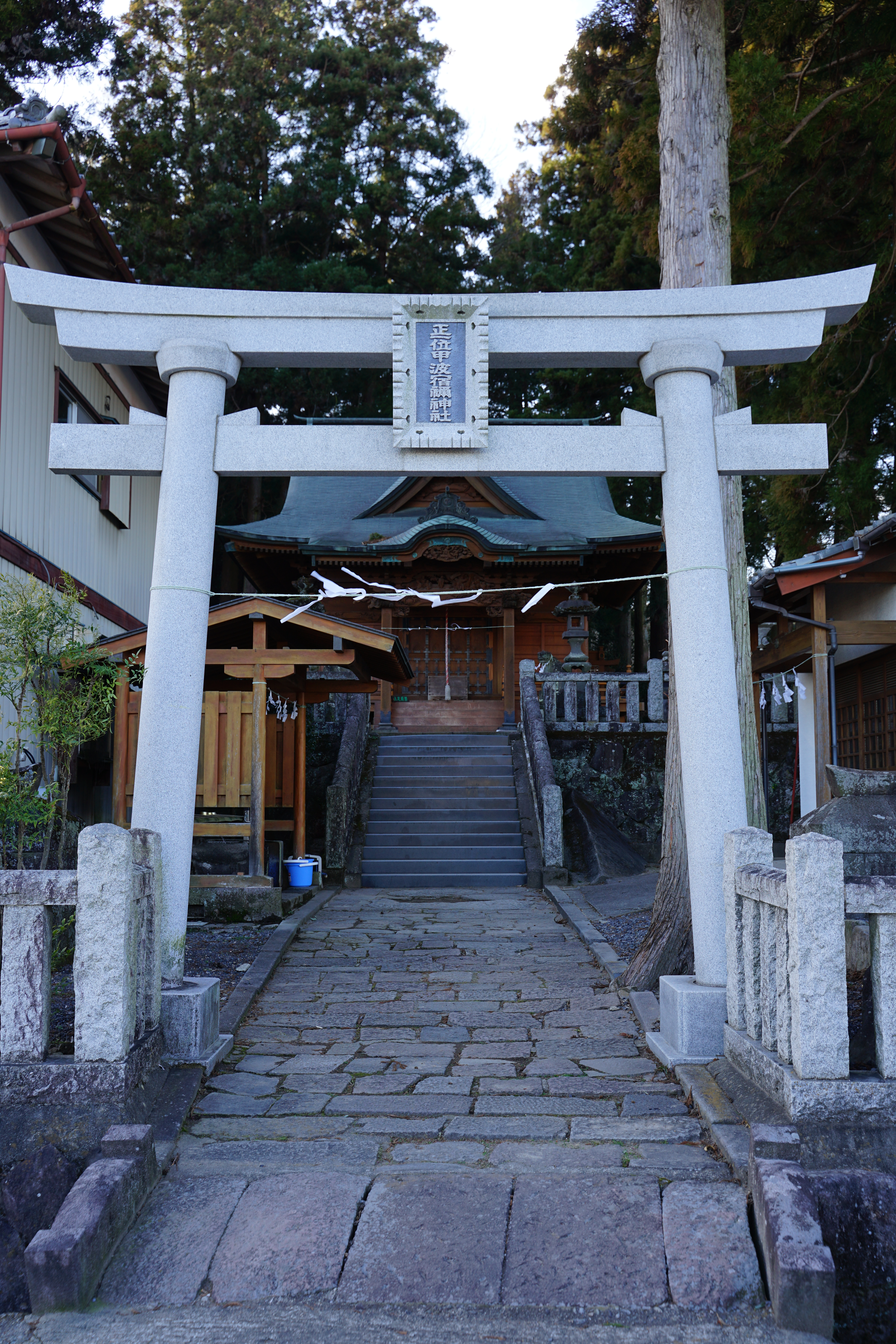 甲波宿禰神社 (渋川市行幸田)の鳥居